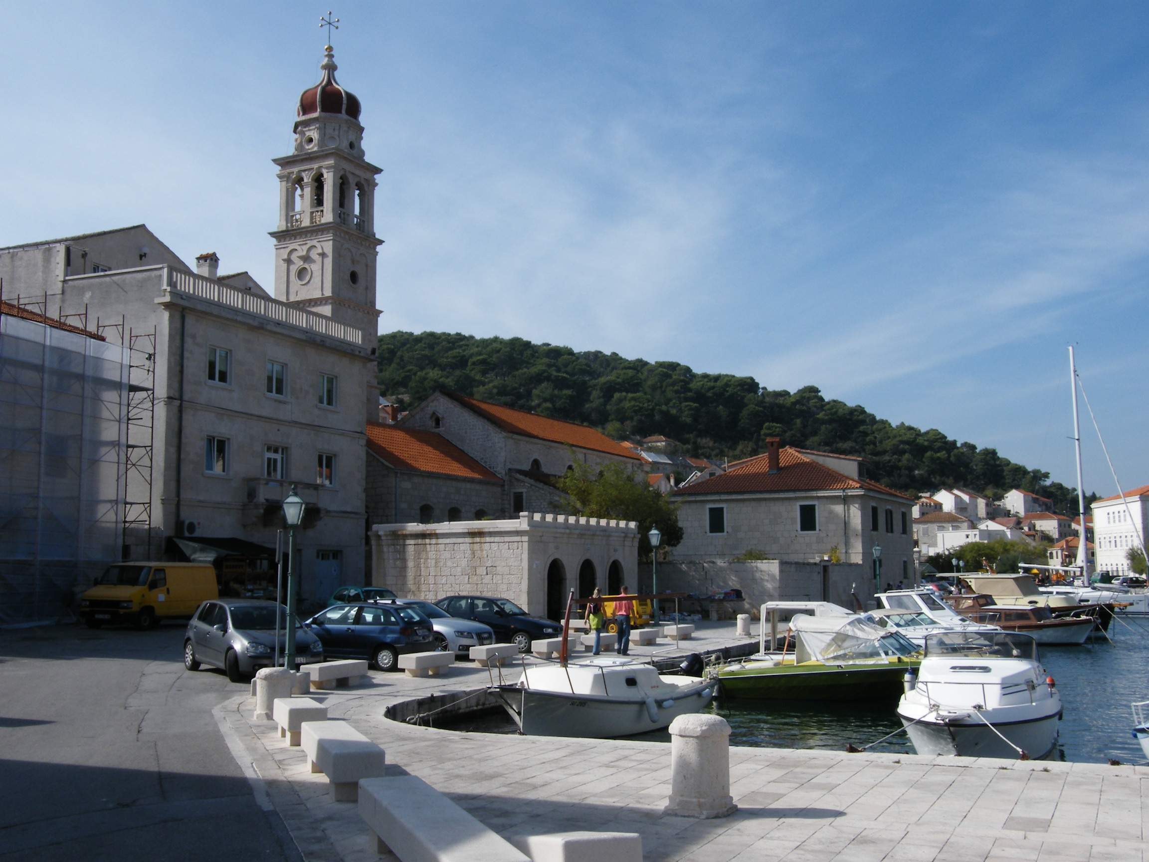 Pučiśća, widok od strony portu.